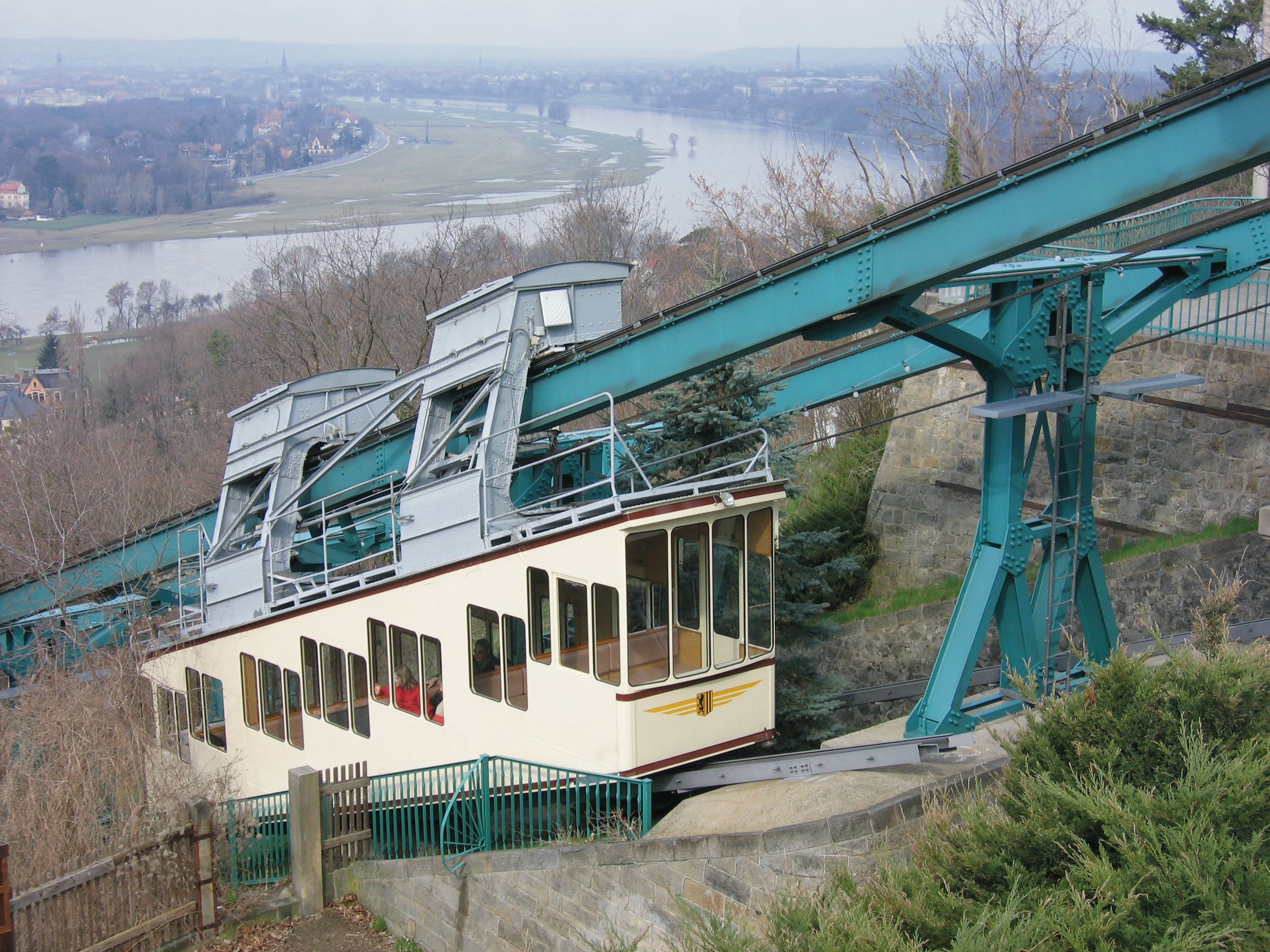 Dresden, älteste Schwebebahn mit Elbe im Hintergrund